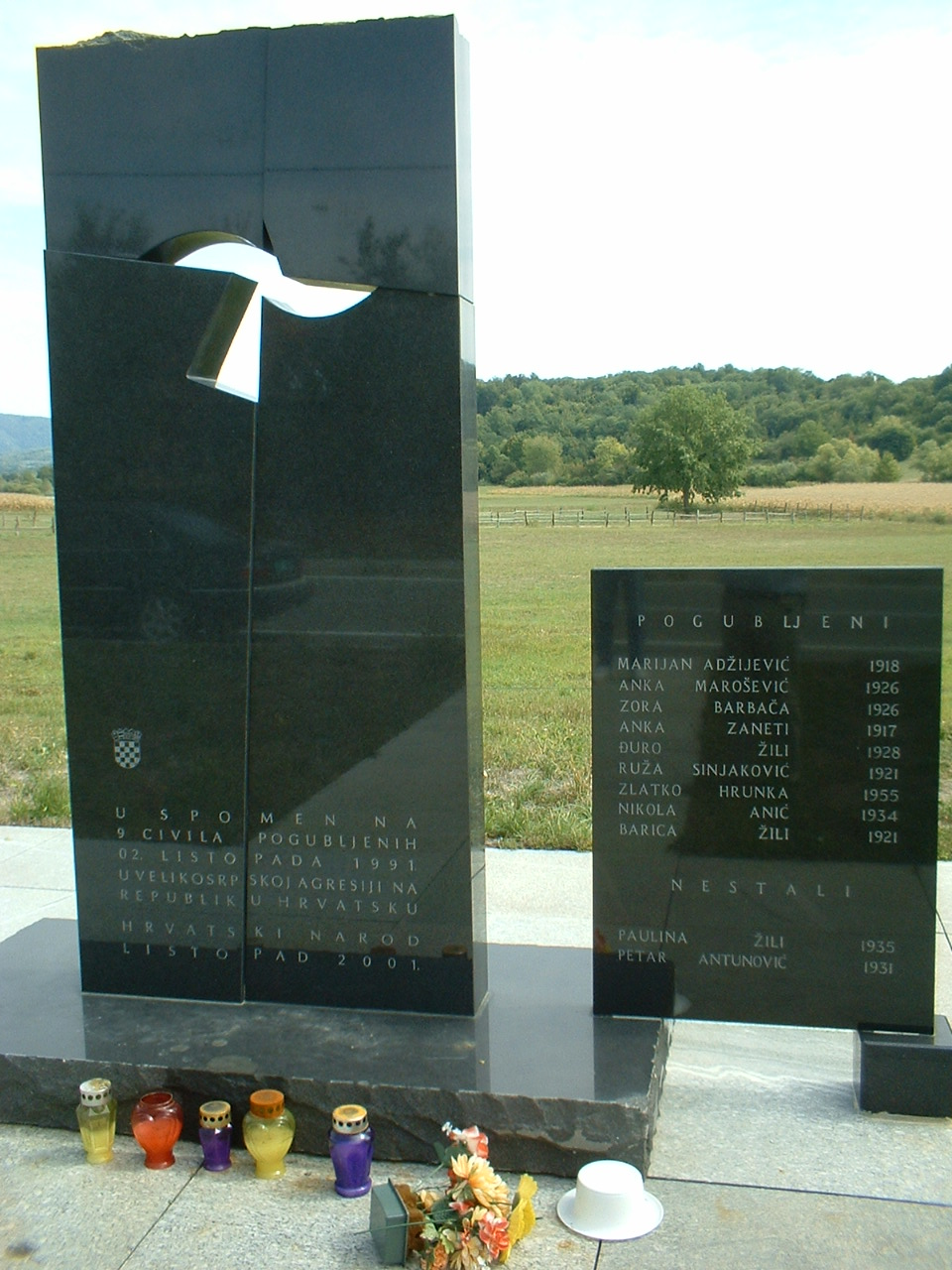 Placa conmemorativa matanza Donji Caglic en el año 1991